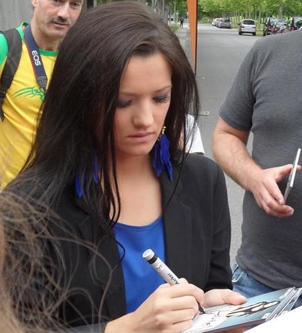 Lolita Jolie im ZDF-Fernsehgarten